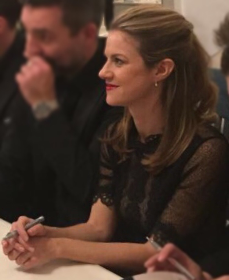 Bei einer Autogrammstunde im November 2017